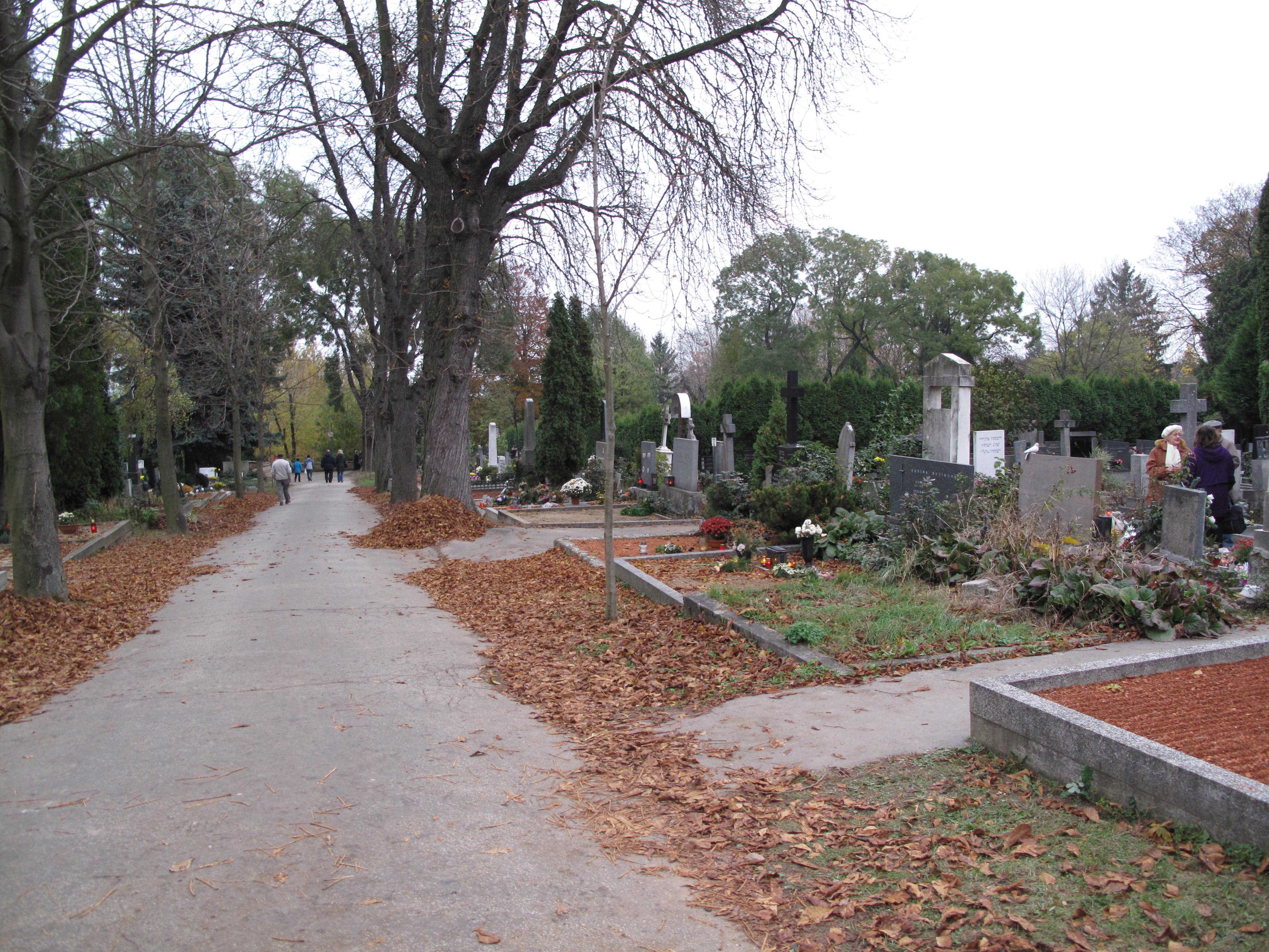 Ústřední hřbitov v Brně